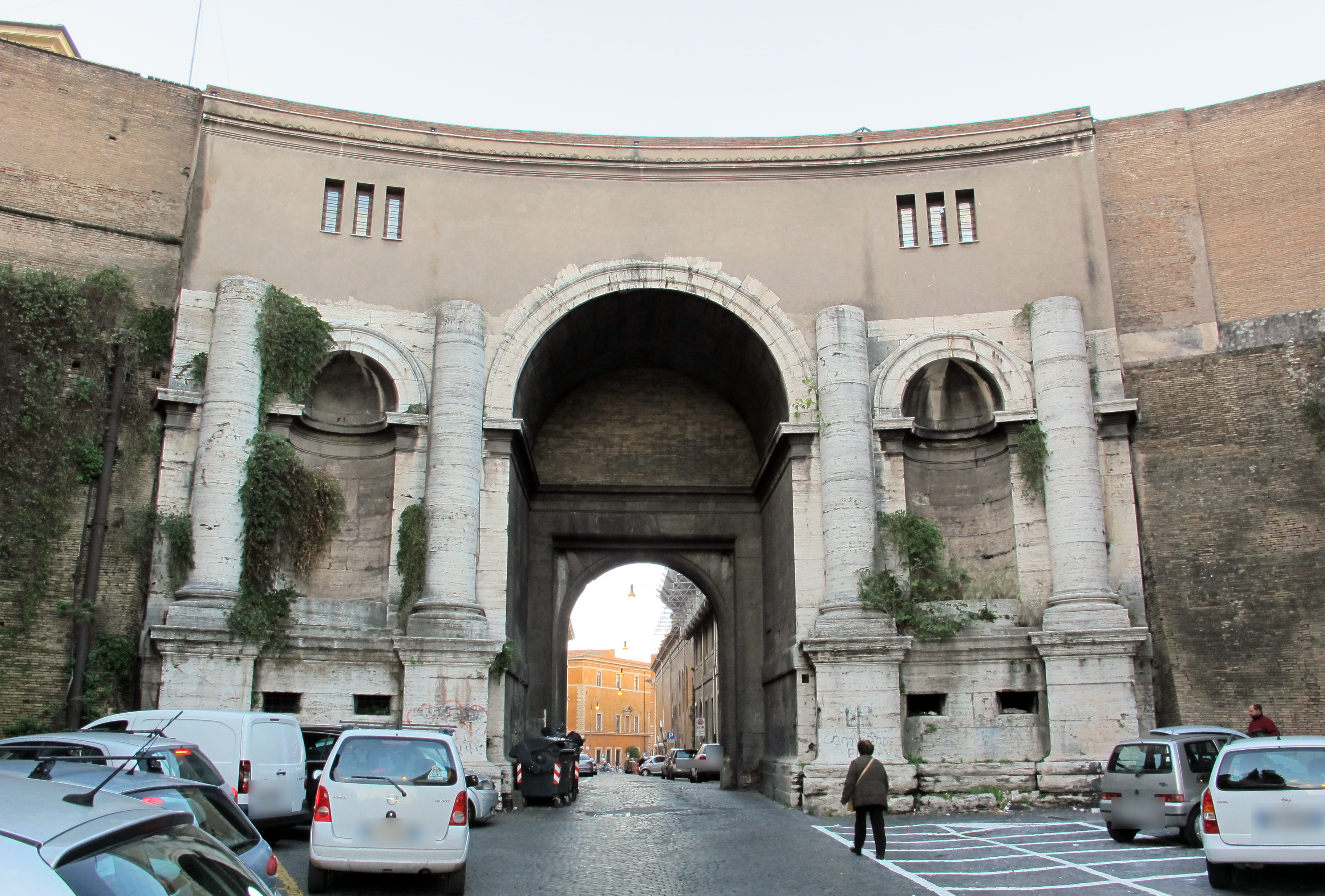 Roma, vedi titolo